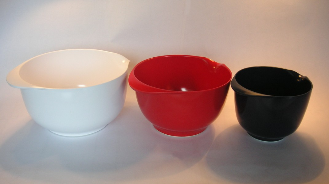 Skål "Margrethe" för Rosti 1950